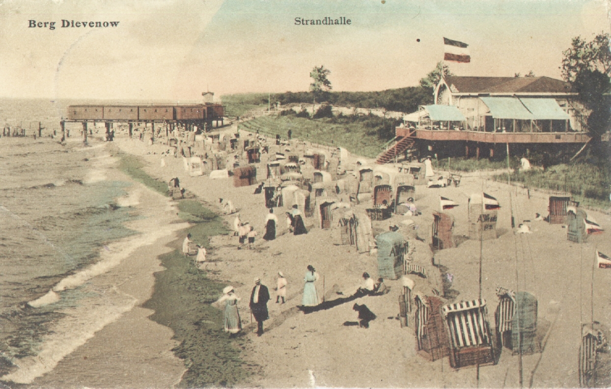 Dziwnów na starej fotografii.